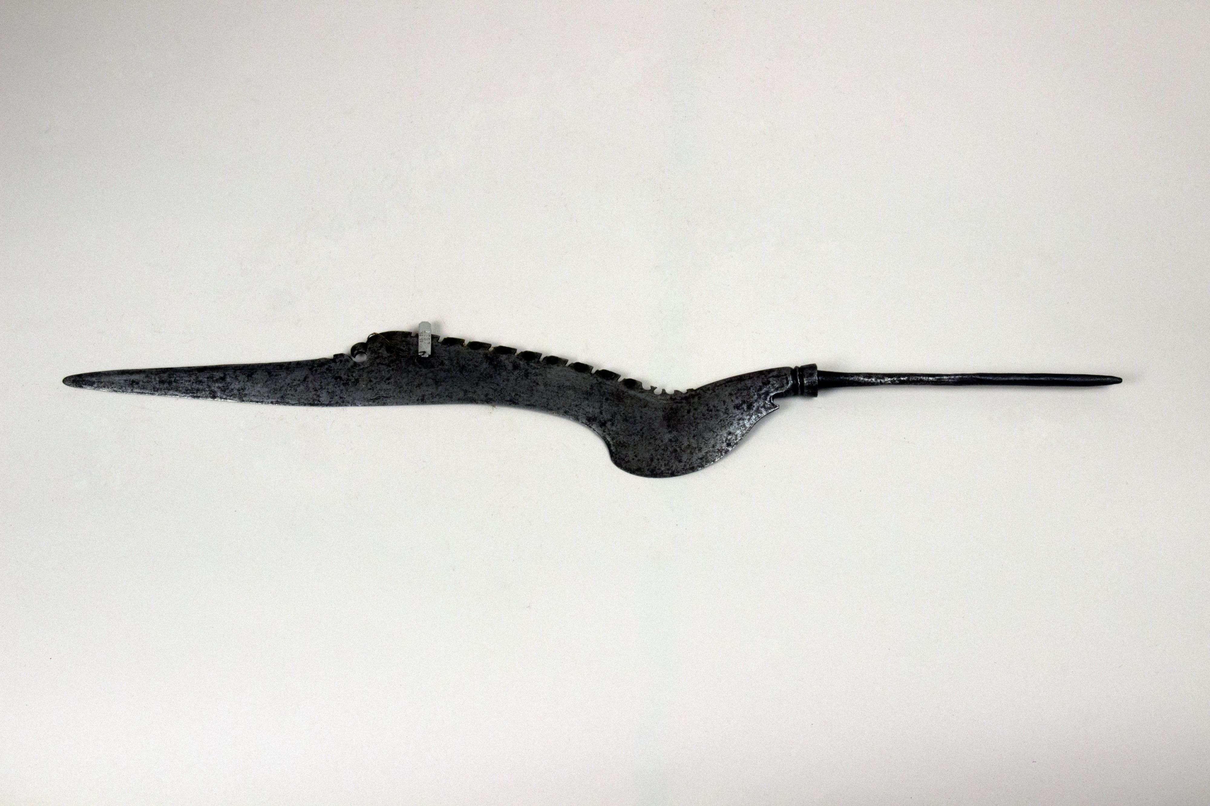 Javanese; Blade (Kudi tranchang); Sword Blades